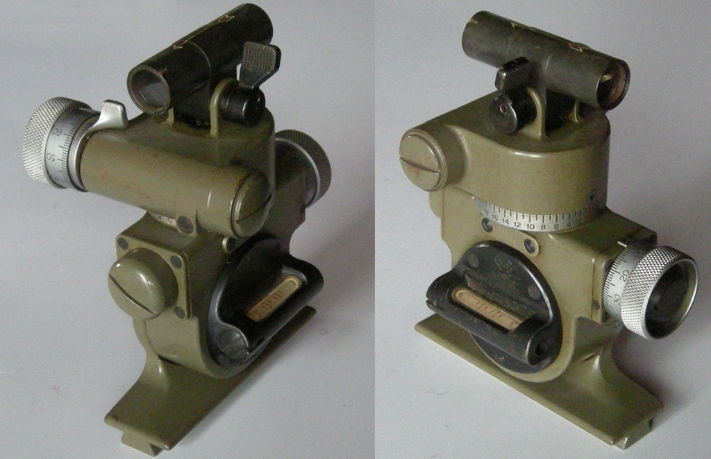 Richtgerät Geb Kan 1938